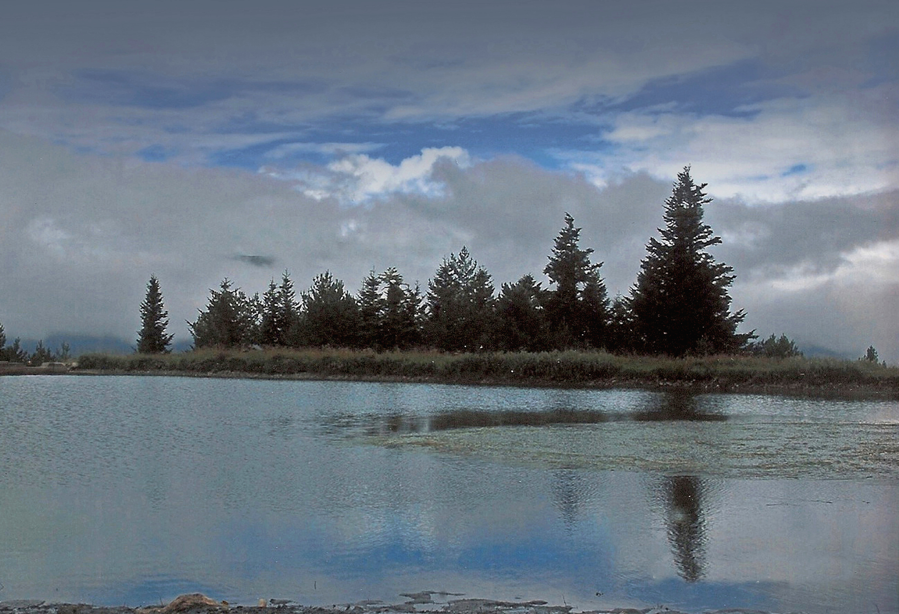 Bassa d´Arres a la Vall d´Aran en un dia ennuvolat This is a a photo of a natural area in Catalonia, Spain, with id: ES510169